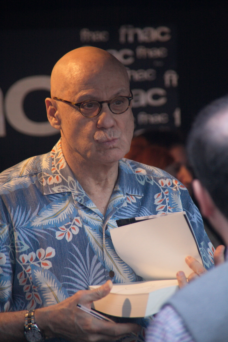 Signatura de llibres en la Diada de Sant Jordi-2015 a Barcelona